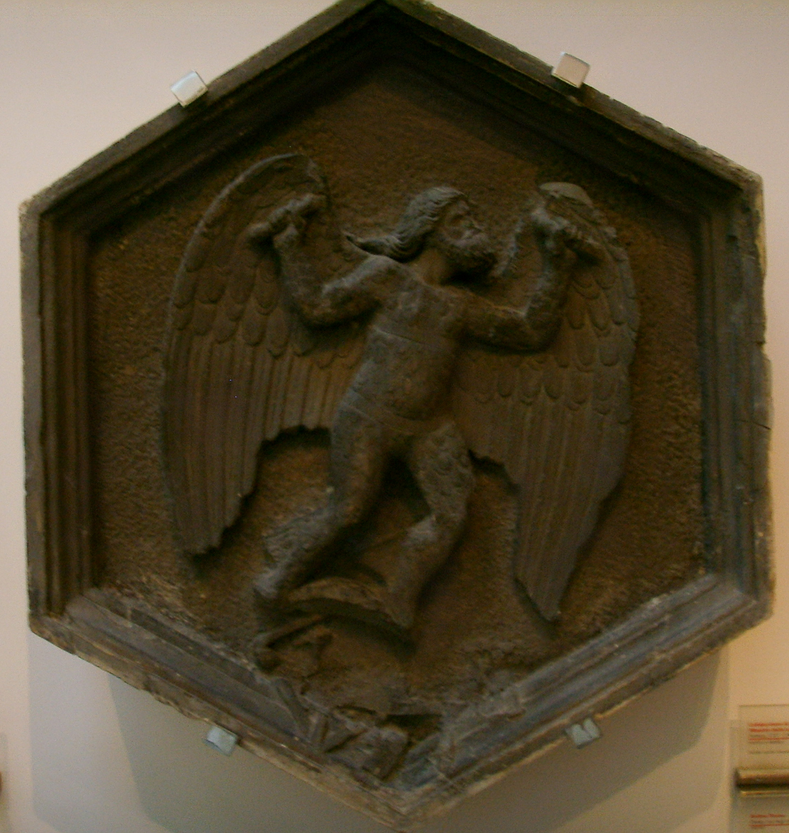 Formella 14, dedalo, avo degli artisti, andrea pisano, 1334-1336